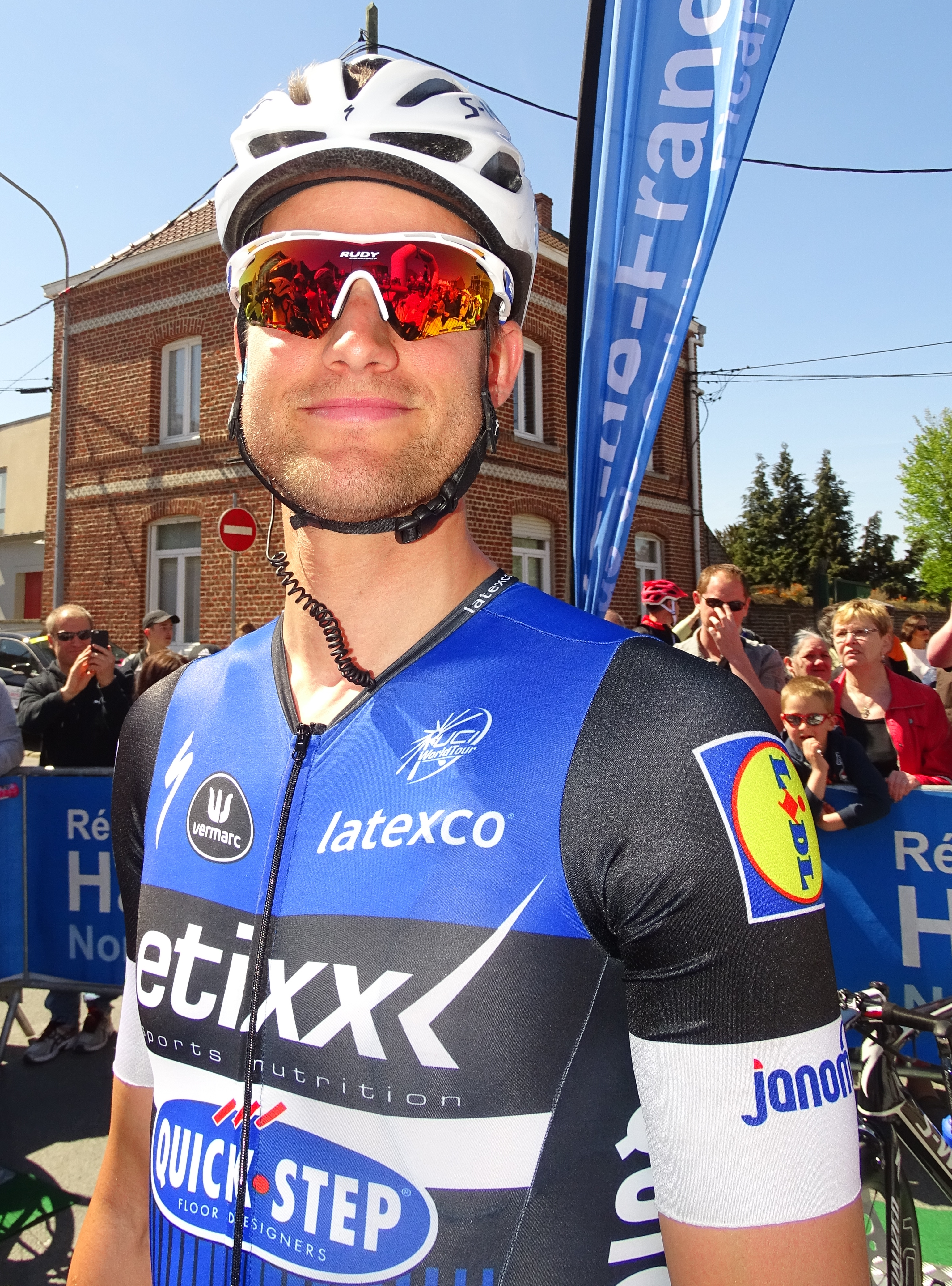 Reportage réalisé le jeudi 5 mai 2016 à l'occasion du départ et de l'arrivée de la deuxième étape des Quatre jours de Dunkerque 2016 à Aniche, Nord, Nord-Pas-de-Calais, France.